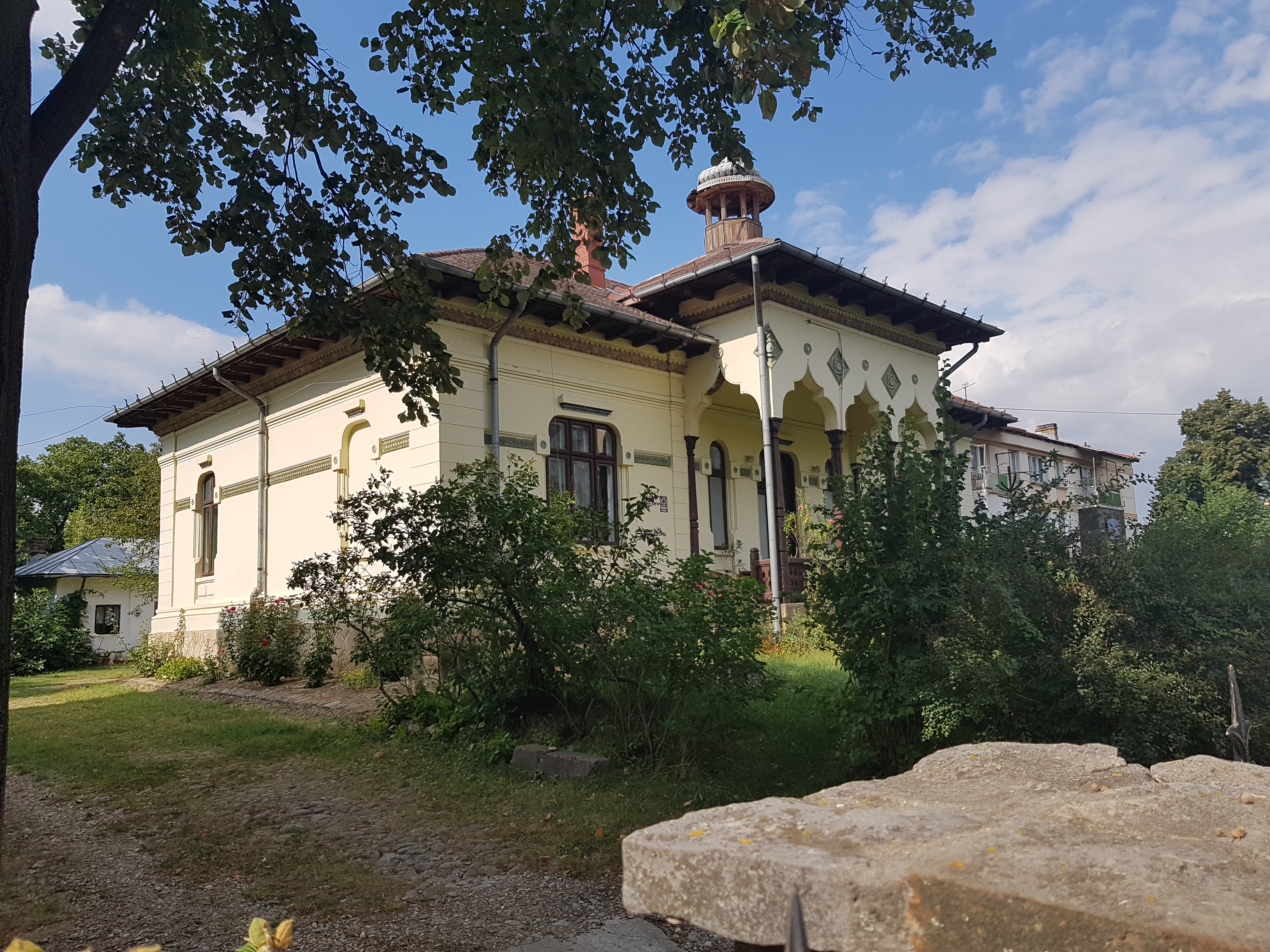 Casa Pogorevici